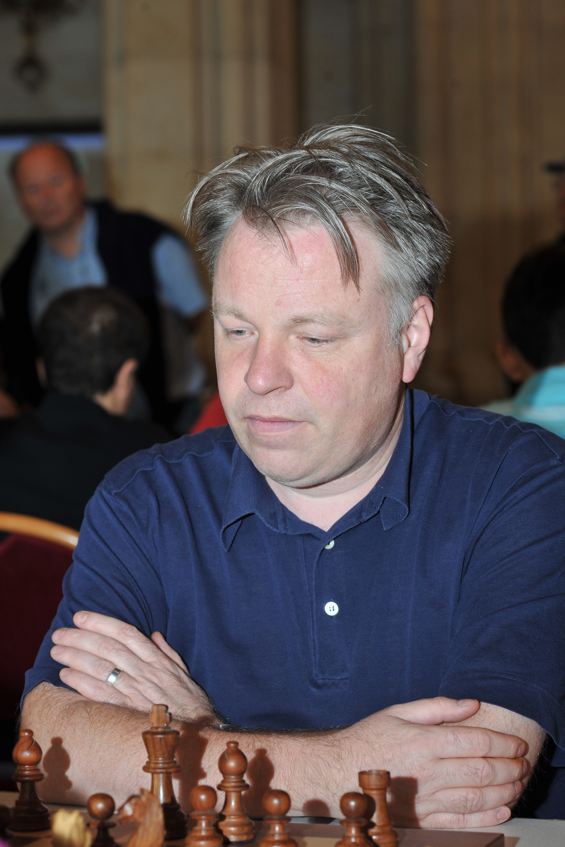 Vienna Chess Open 2013, A-Turnier: 8. Runde am 24. August 2013 - GM Gerald Hertneck